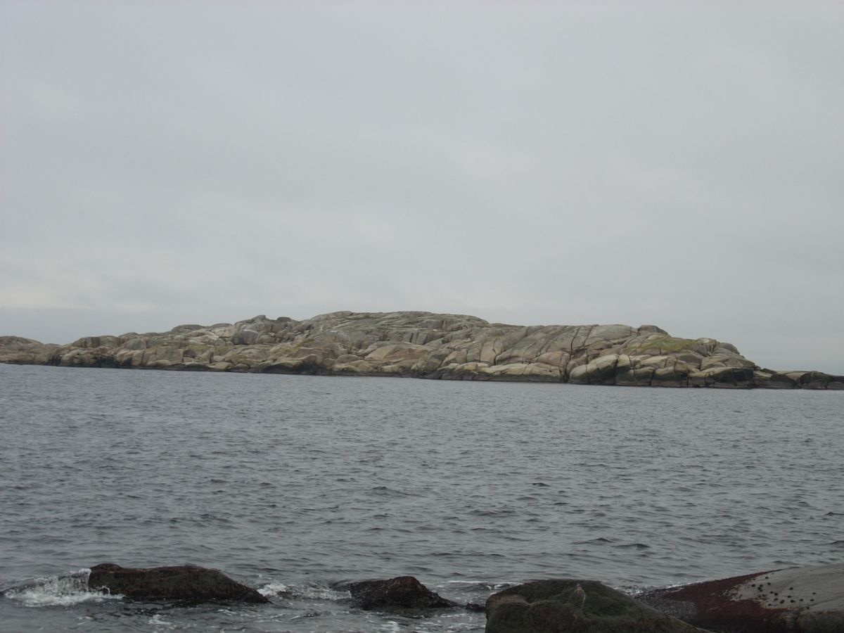 Lyngholmen er en typisk utskjærgårdsøy, naken og værbitt, men en god hekkeplass for måker.